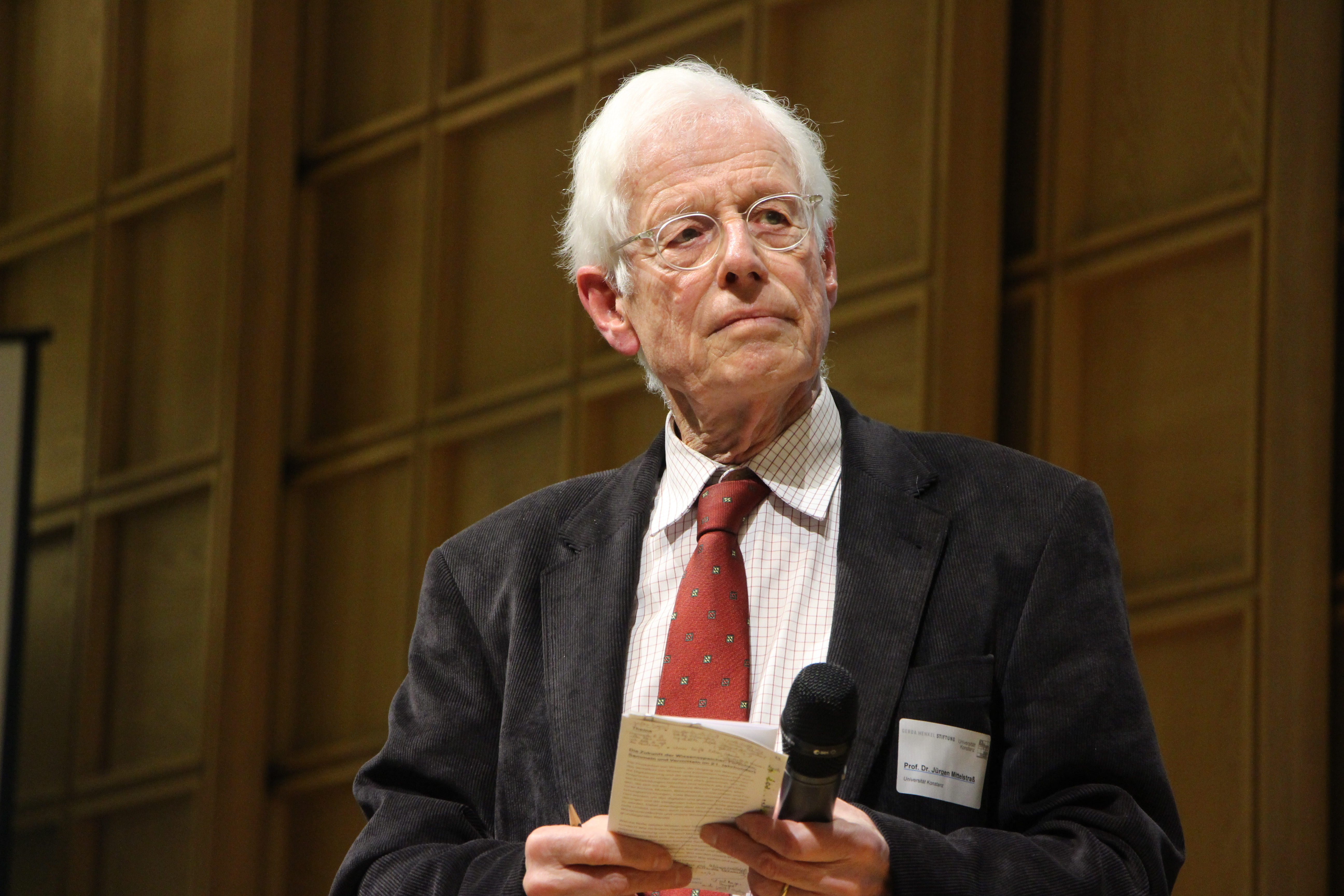 Wissenschaftsforum Universität Konstanz Gerda-Henkel-Stiftung 2015, Düsseldorf.